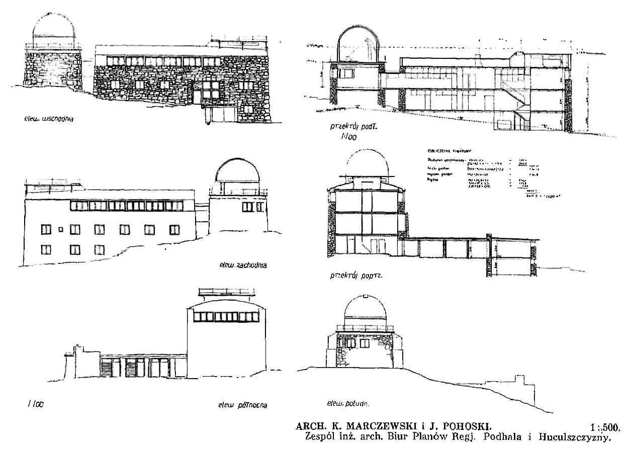 Проект-переможець тендеру для будівництва обсерваторії